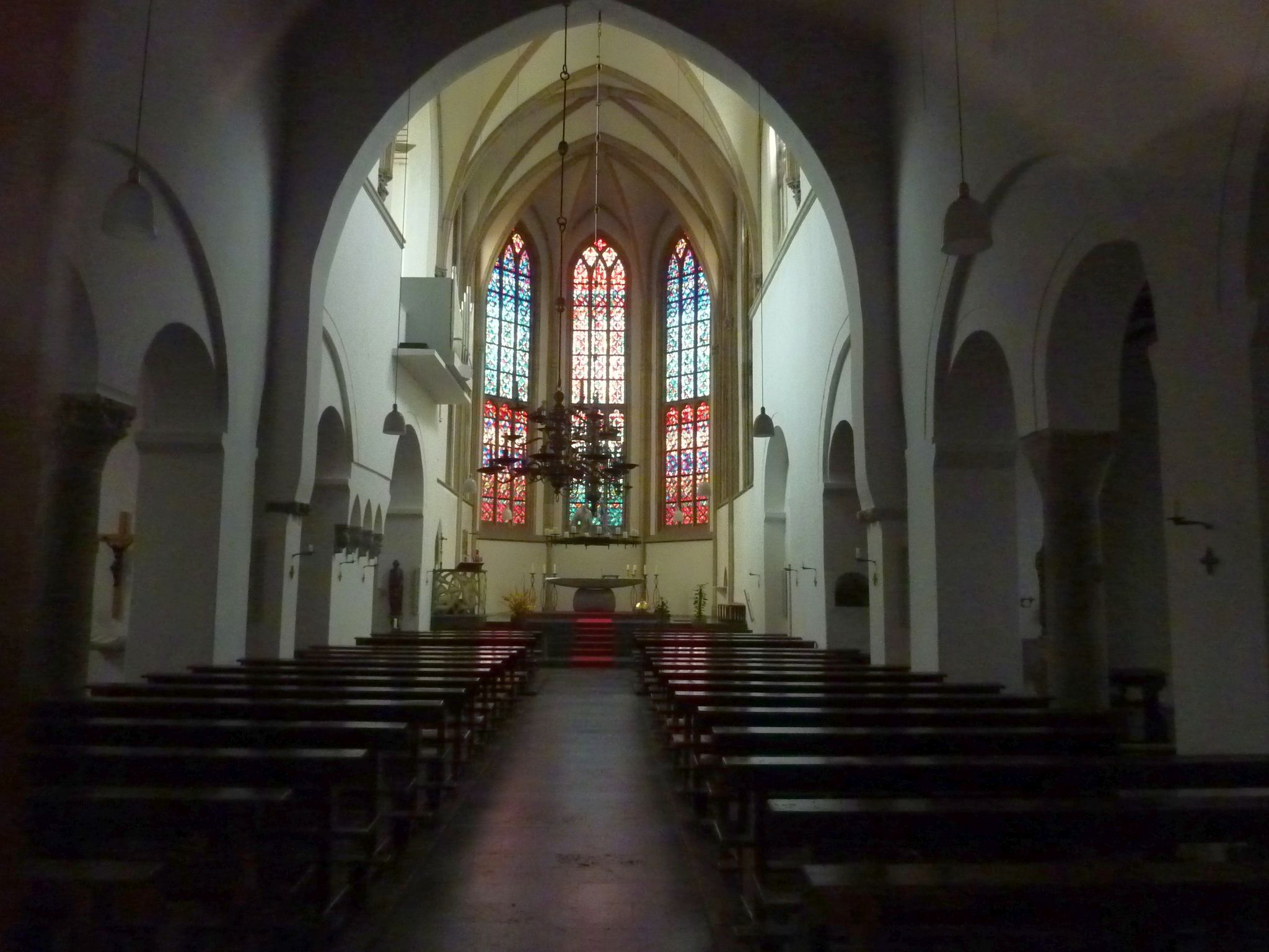 Saint Martin Church (Zyfflich)